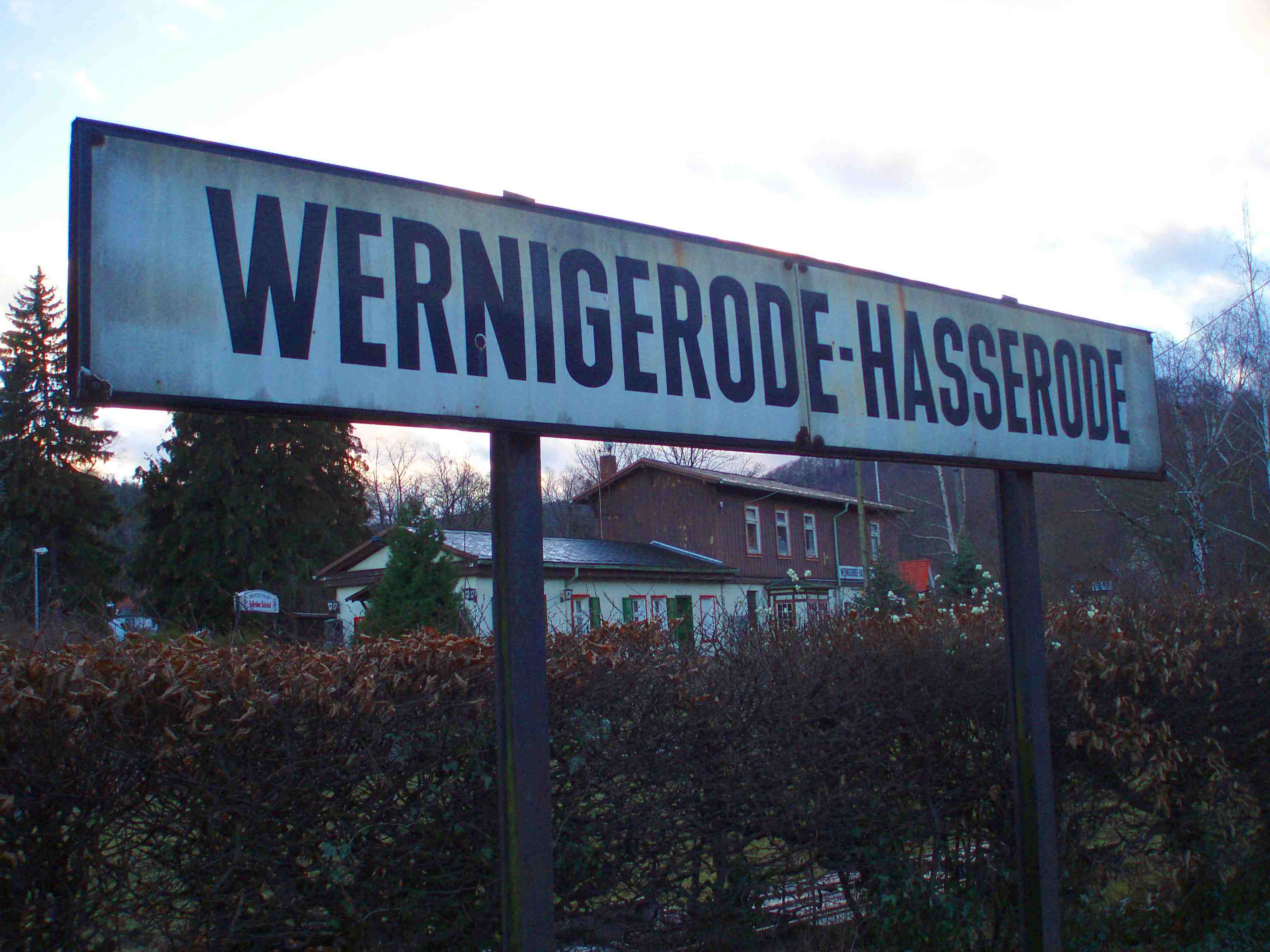 Hasserode